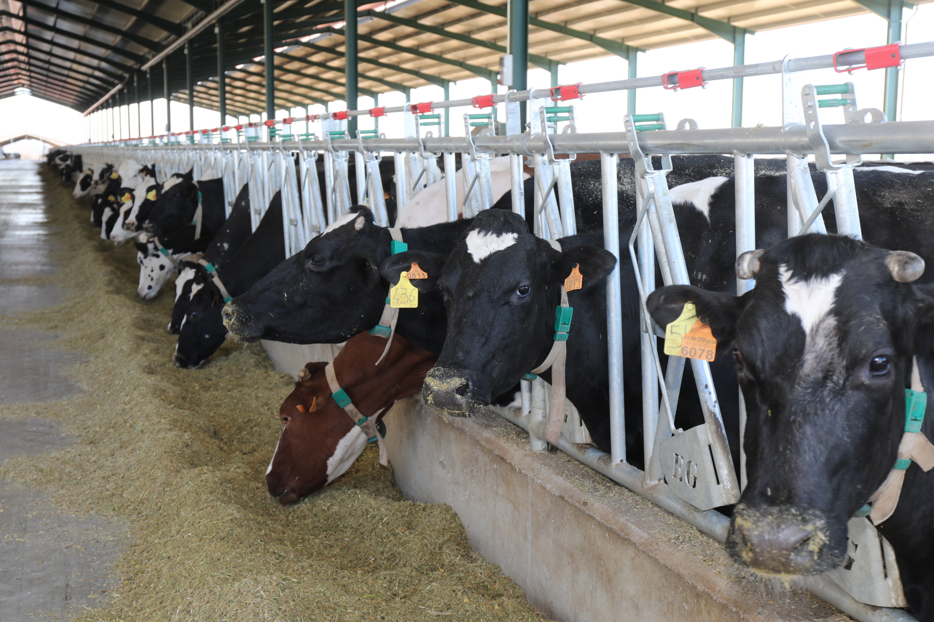 Isabel Diaz Ayuso acude a la ganadería SAT en el Soto de Navalafuente.